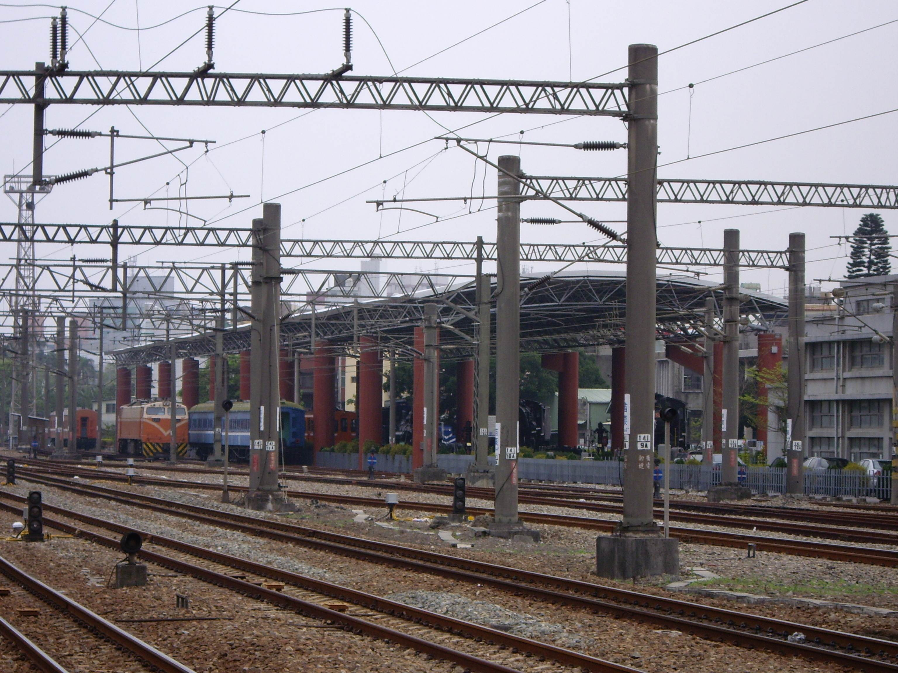 苗栗鉄道文物展示館，苗栗駅構内撮影